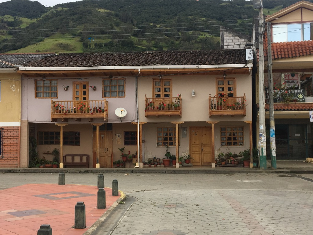 En la plaza de El Pan se pueden encontrar casas coloridas en las cuales se brindan diversos servicios básicos.